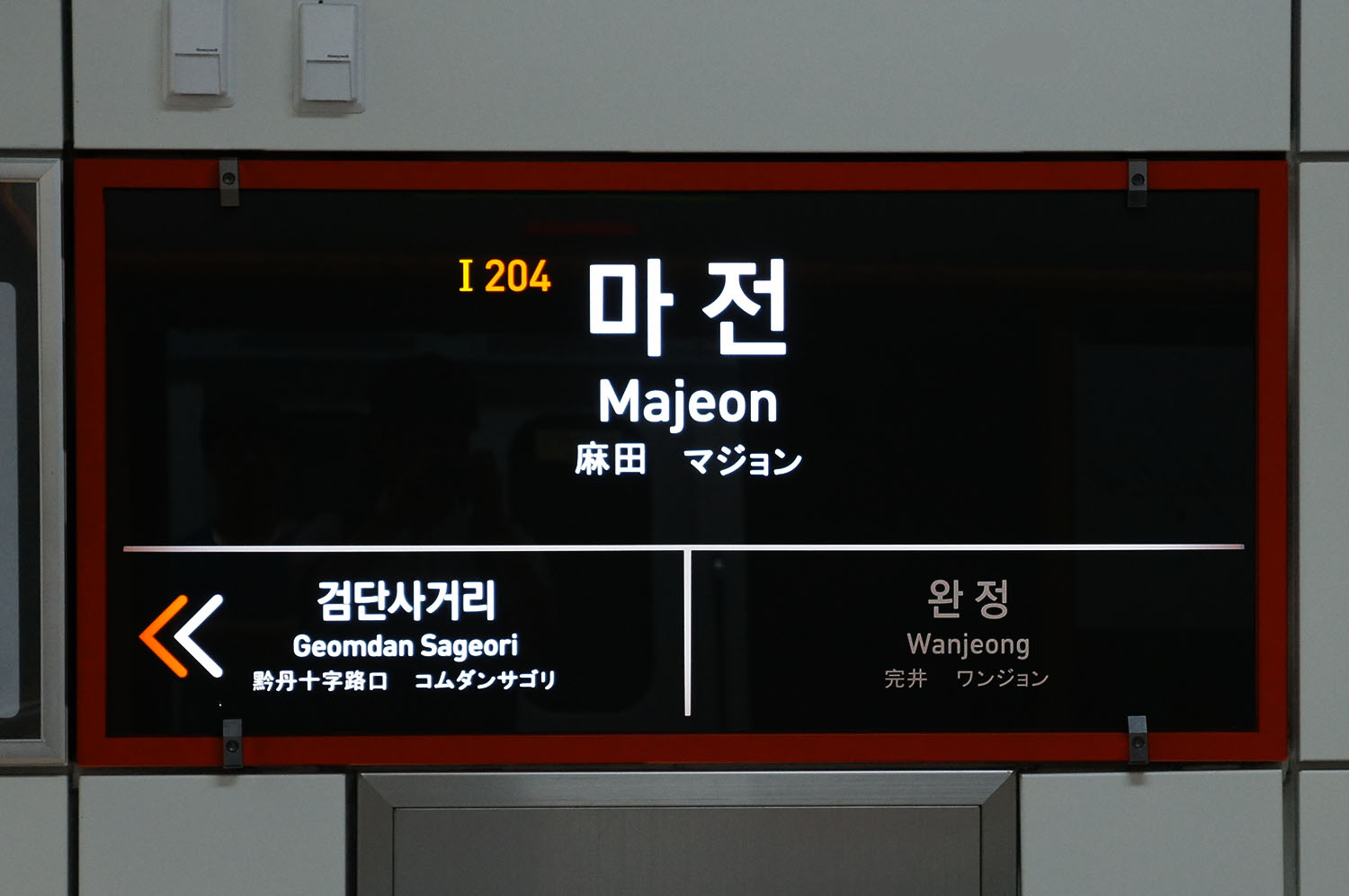 마전역 역명판